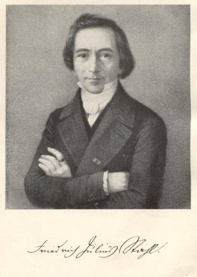 Portrait des Politikers